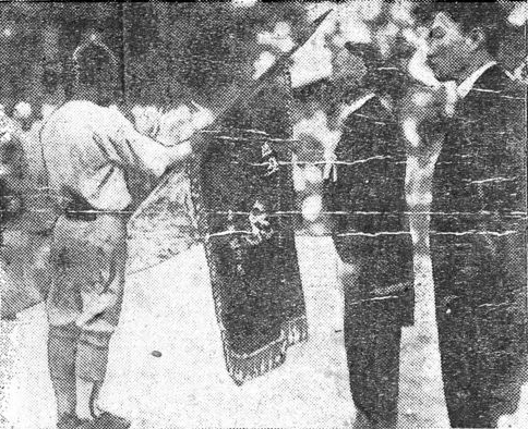 1923년 전국체육대회 야구(제4회 전조선야구대회) 중학부 우승 선수단에 대한 우승기 수여 장면. 휘문고등보통학교 선수단에 우승기를 수여하고 있다.